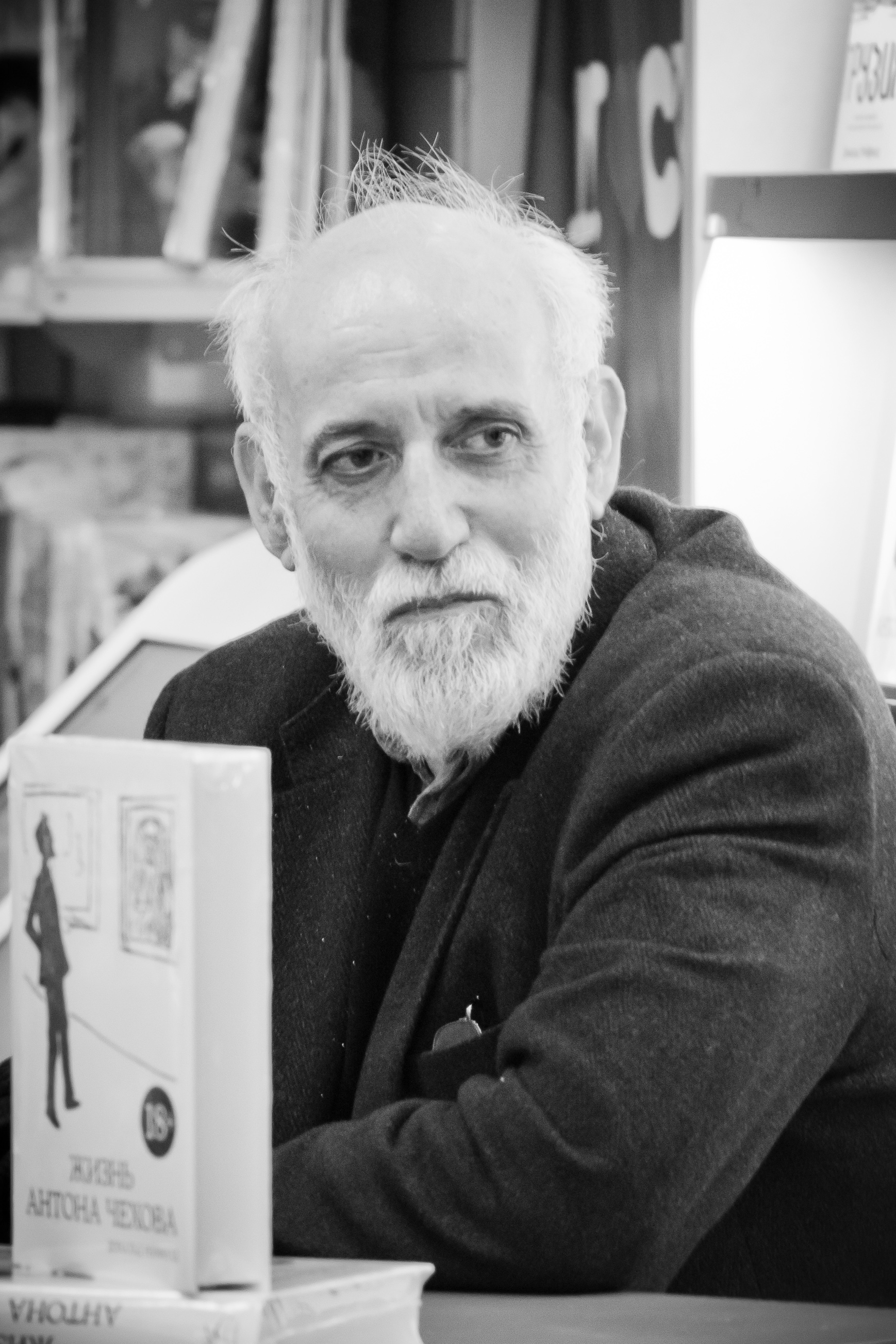 британский литературовед и историк, профессор русской и грузинской литературы Дональд Рейфилд